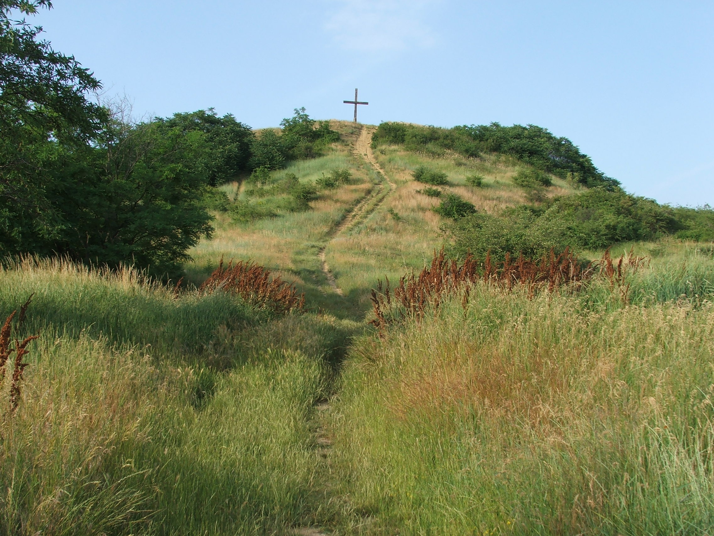 Békásmegyer, kálváriadomb-pusztadomb